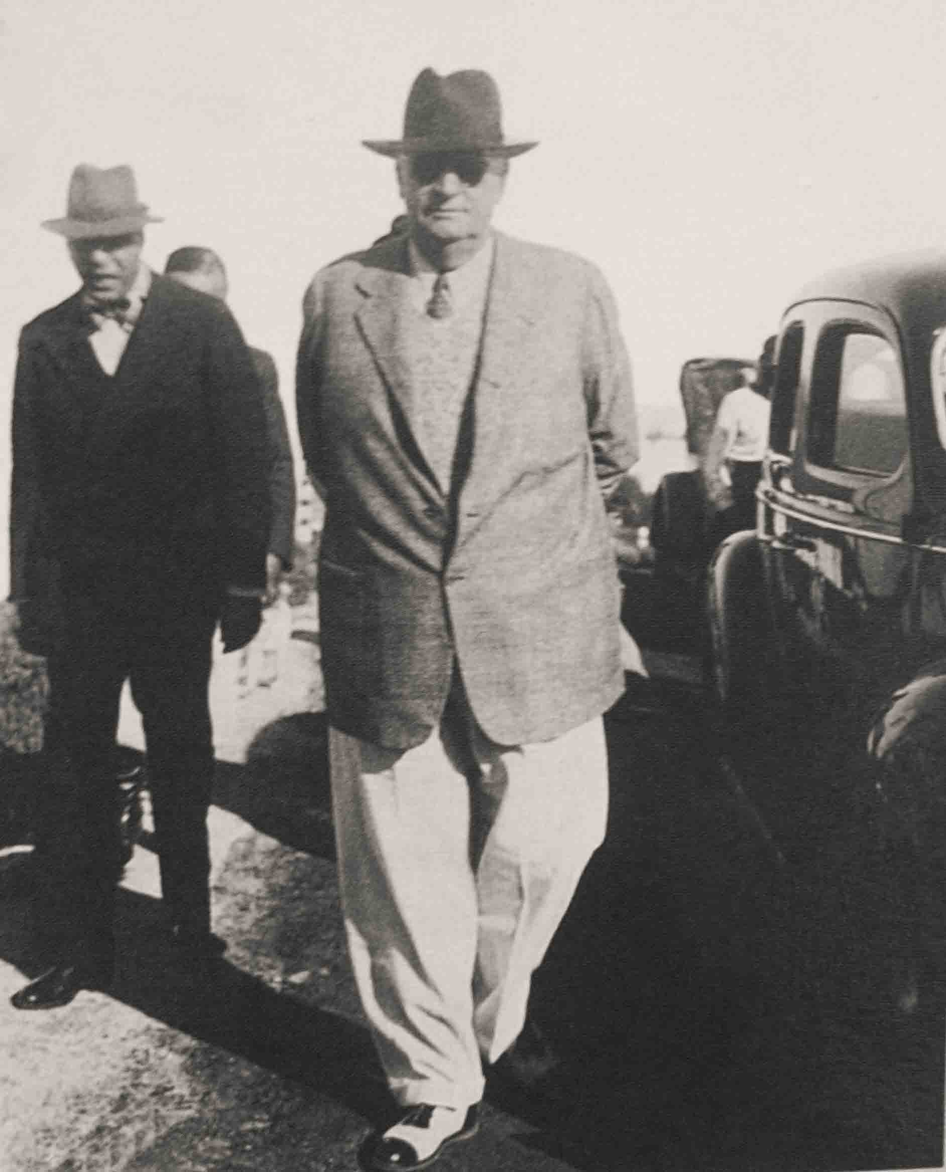 Alvear en sus últimos años de vida.